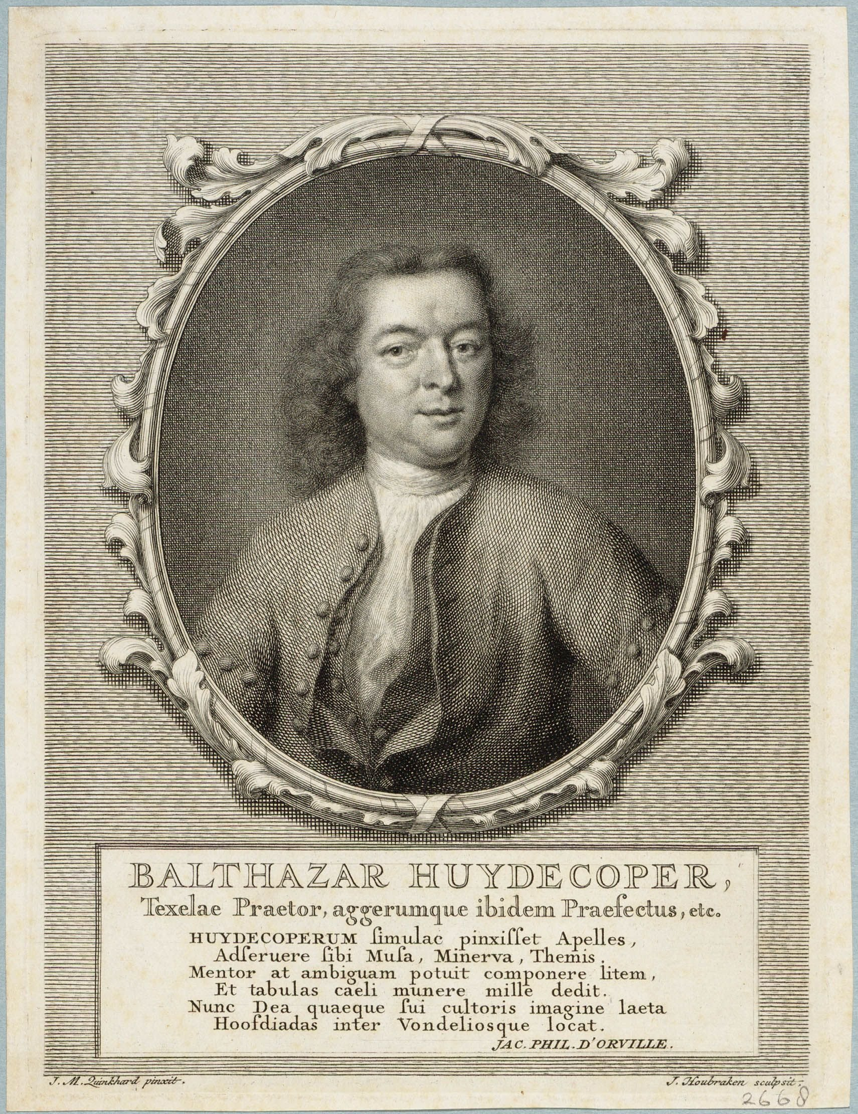 Balthazar Huydecoper. * Amsterdam 1695 - + Amsterdam 24 september 1778; studeerde rechten in Amsterdam. In 1740 werd hij Schepen van deze stad en vervolgens baljuw van Texel. 2668 Collectie:Provinciale Atlas - Portretten Inventarisnummer: NL-HlmNHA_587_000284_K Beschrijving: 174 x 129 mm. 0284 Code: 0284 Documenttype: Portretten Vervaardiger: Quinkhard, Jan Maurits (1688-1772), Houbraken, Jacob (1698-1780)